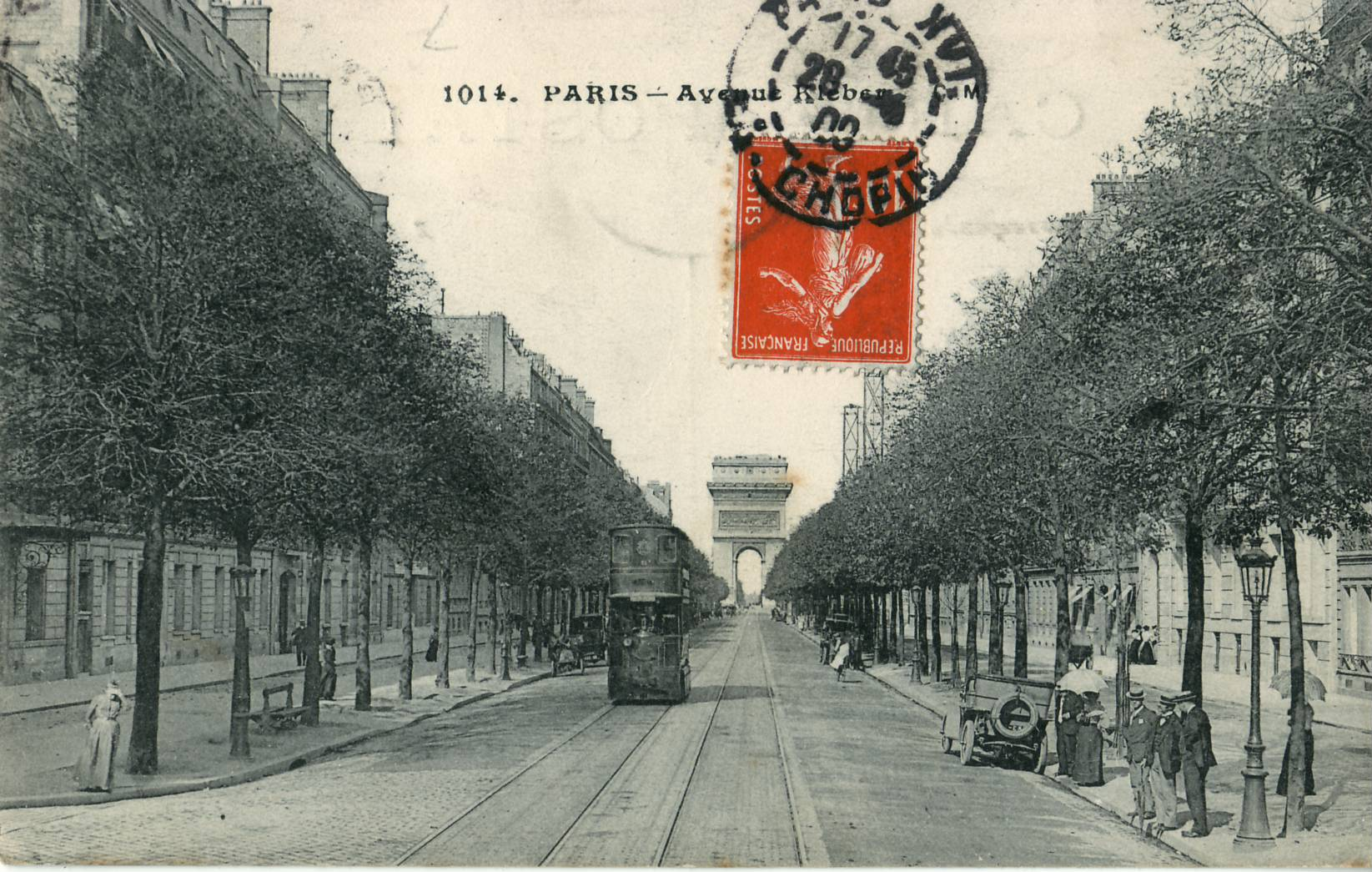 Carte postale ancienne éditée par CM, n° 1014 : PARIS - Avenue Kléber